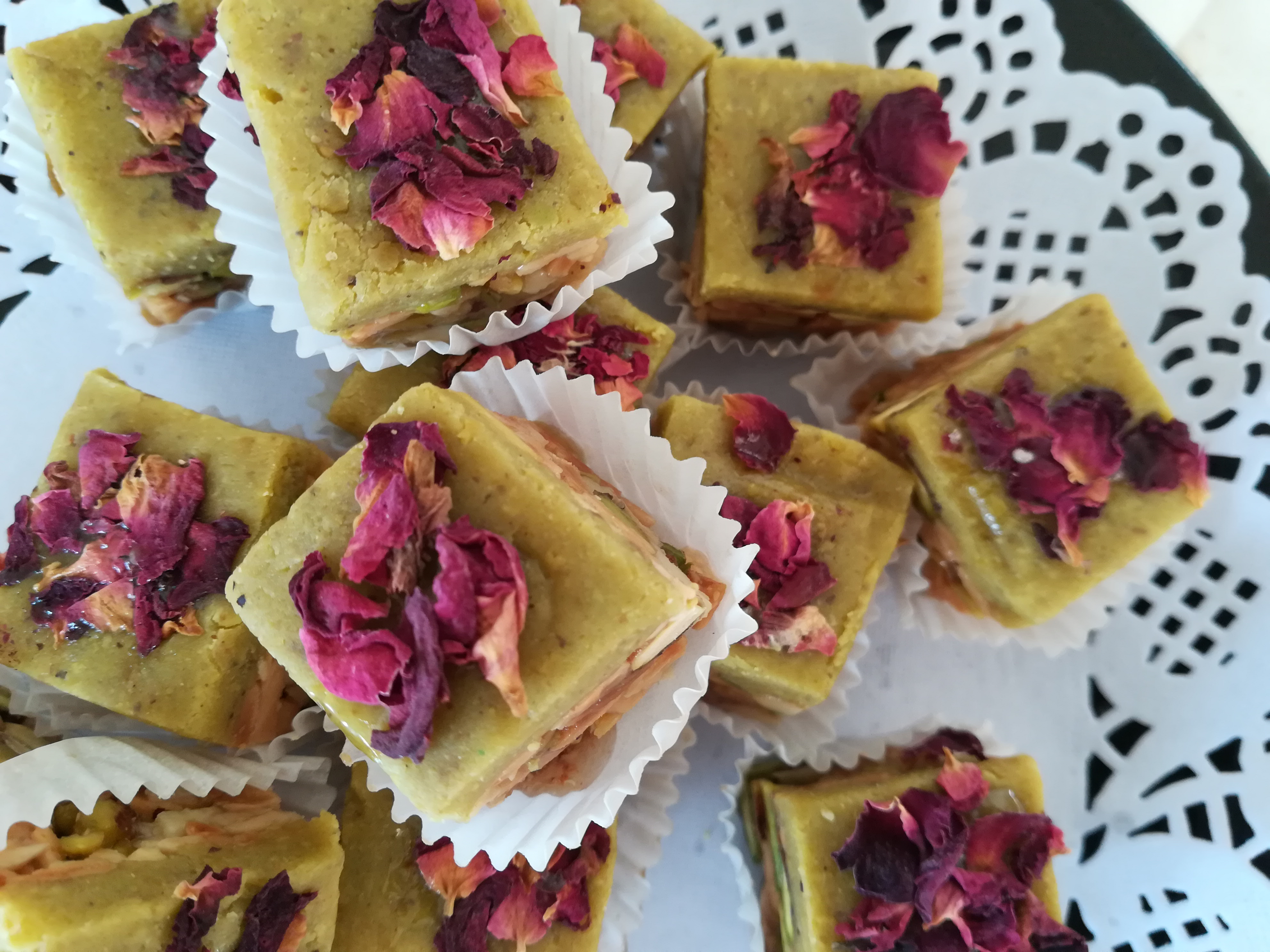 Gateaux tunisiens aux amandes et pistaches